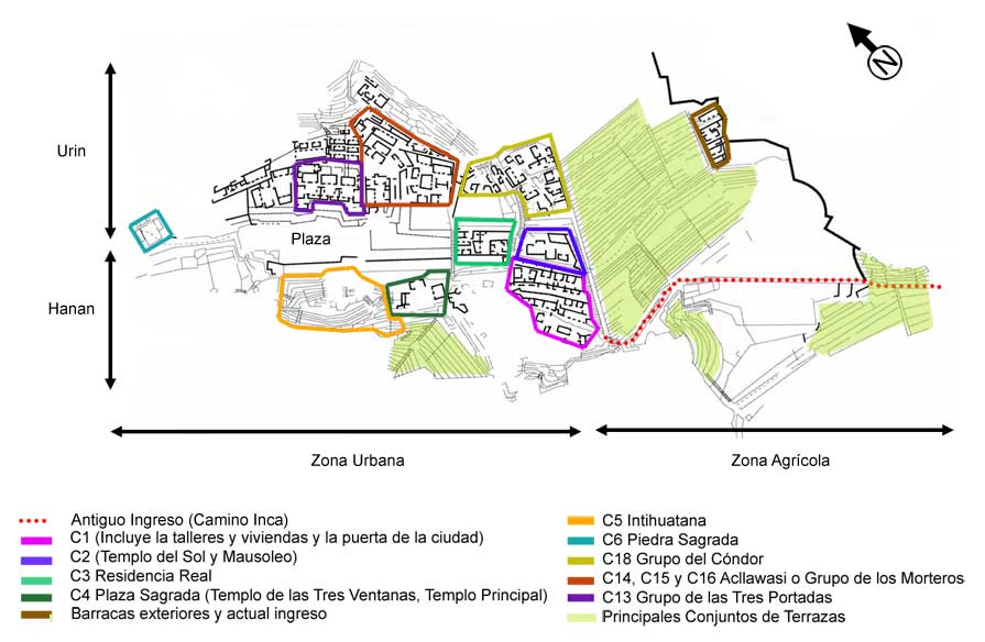 Mapa de Machu Picchu (Machu Picchu Map)